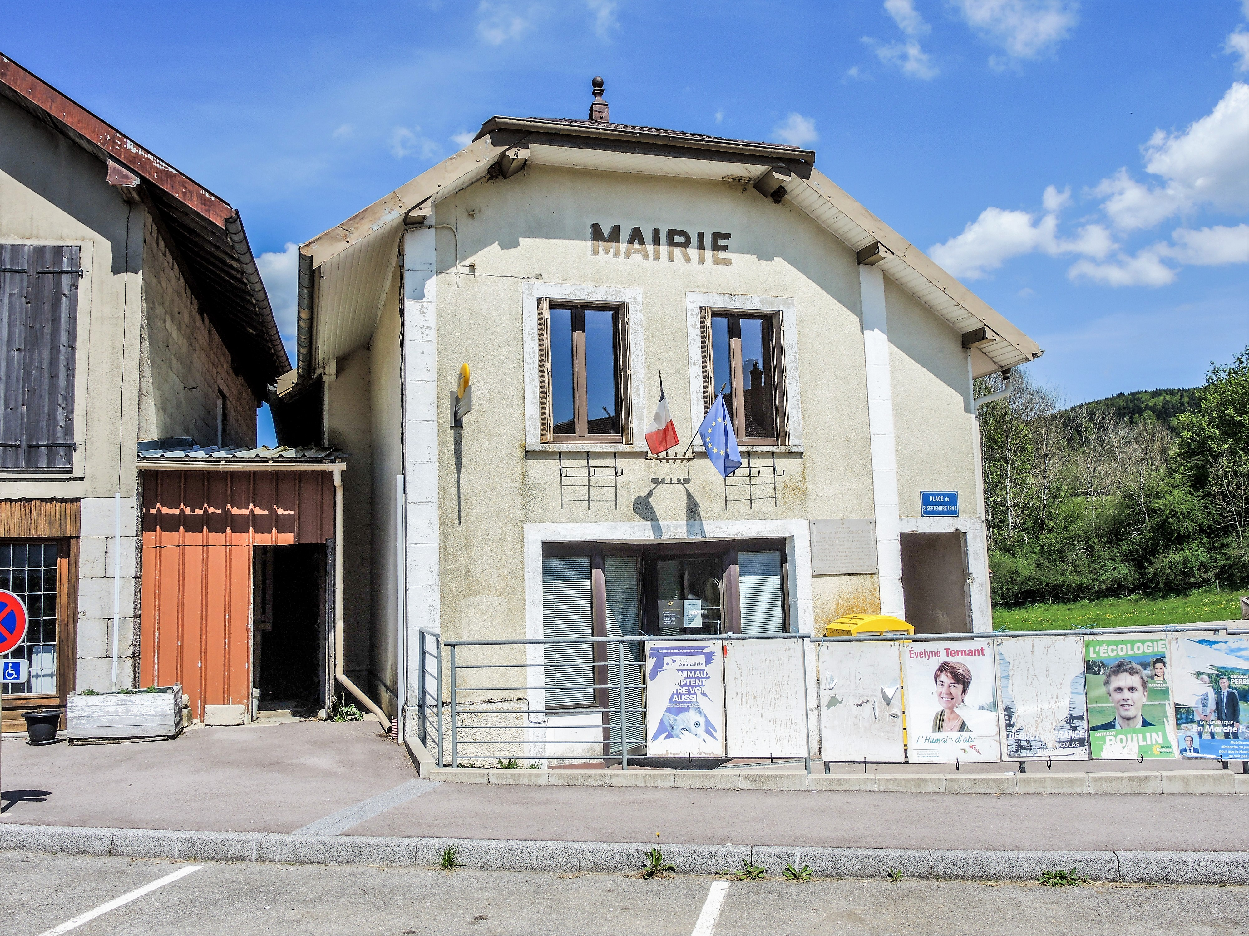 Mairie